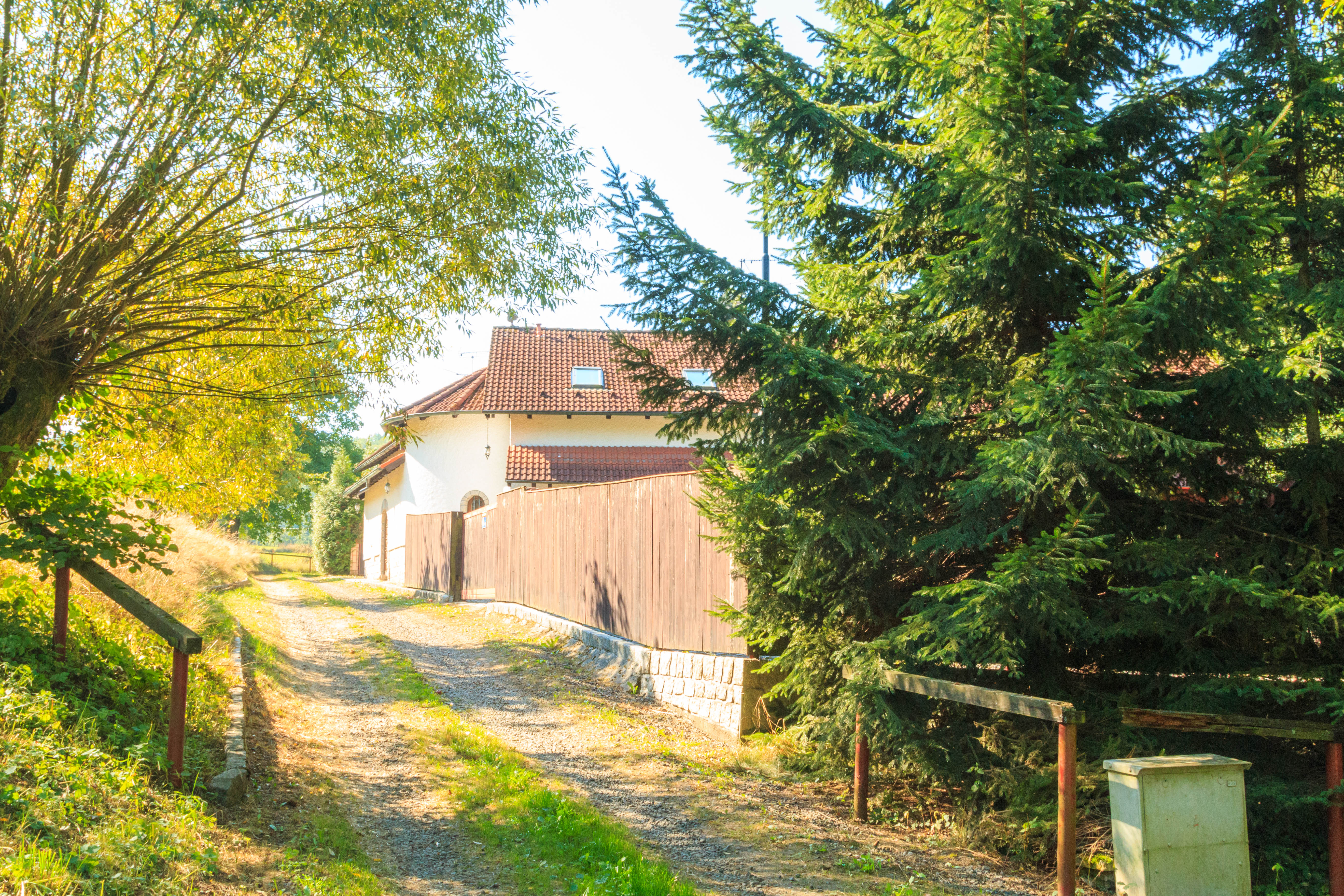 Tikov u Lomnice nad Popelkou - čp. 1